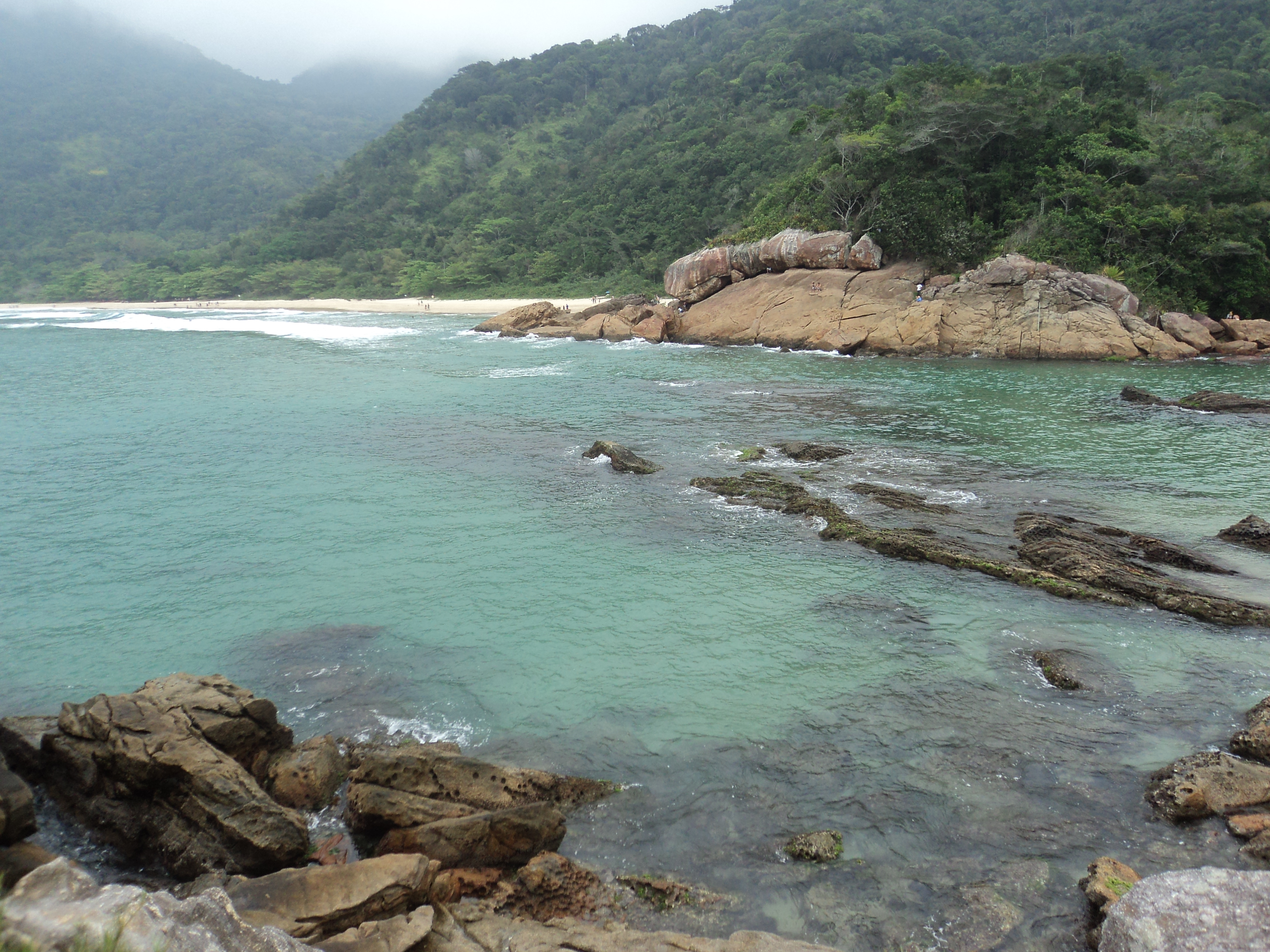 Esta é uma foto tirada em vila de Trindade, município de Paraty - RJ.